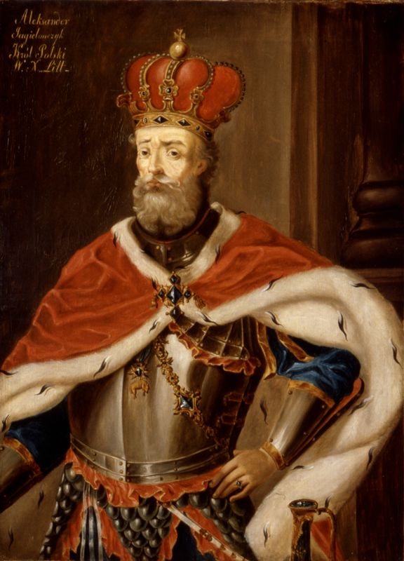 Беларуская (тарашкевіца): Партрэт караля польскага і вялікага князя літоўскага Аляксандра (Alaksandar)